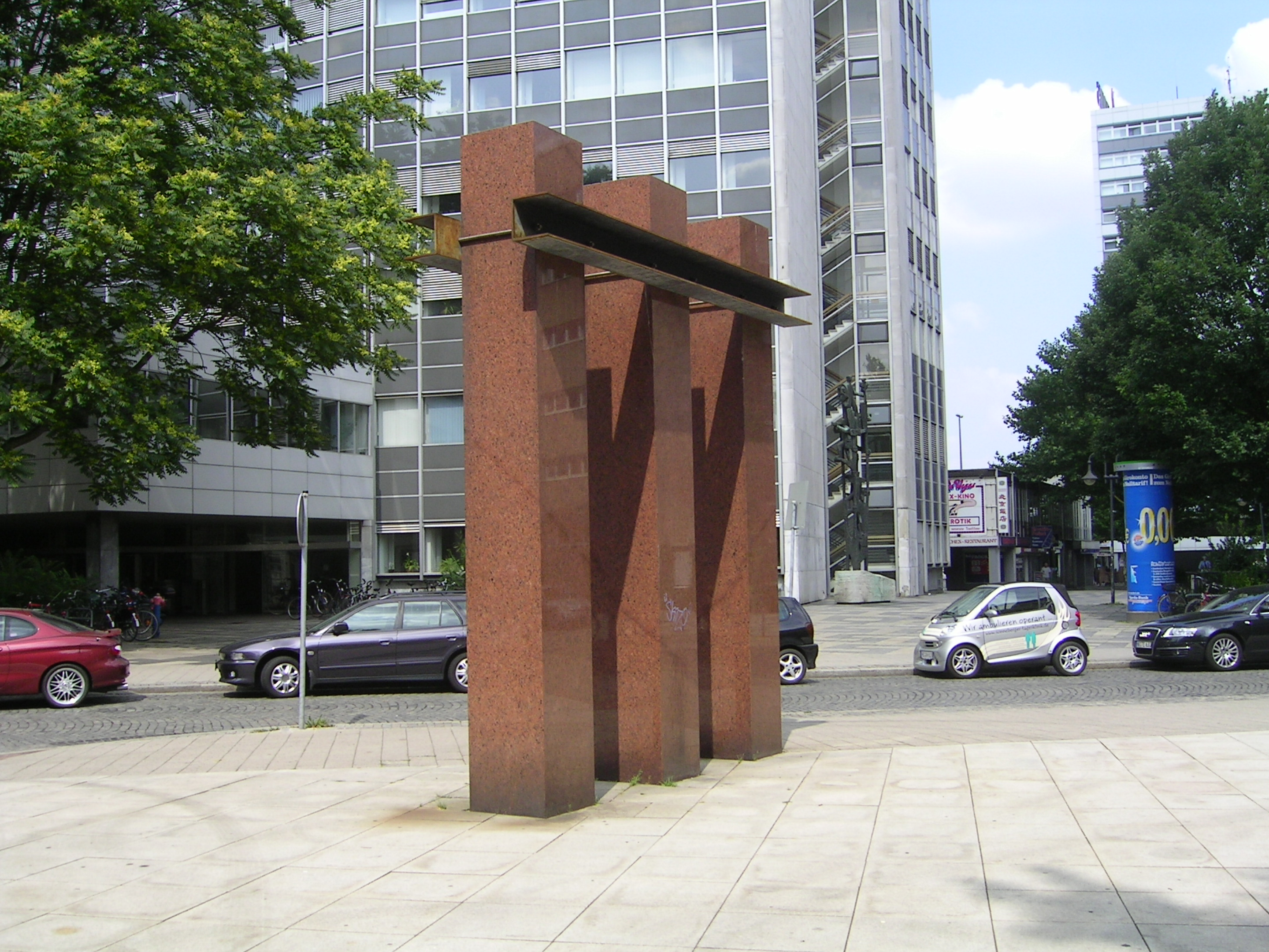 "der senator fur finanzen" building in Bremen City